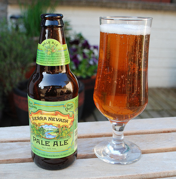 A seminal US ale. 5.6% ABV.